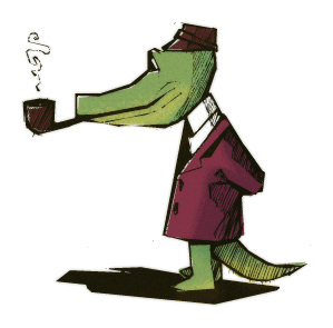 Krokodill Gena